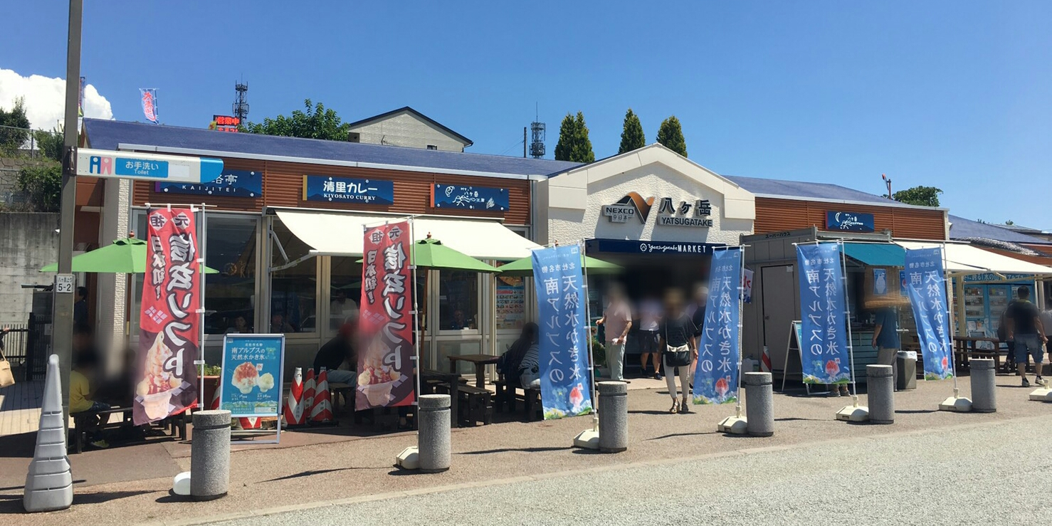 八ヶ岳パーキングエリア